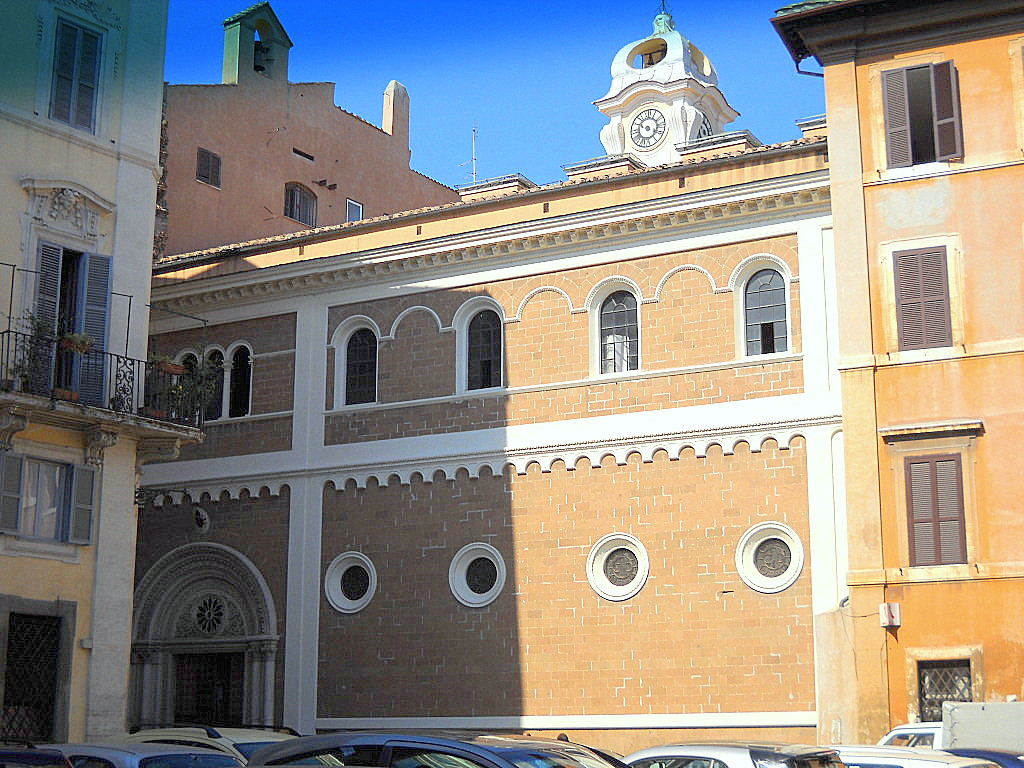 Roma, Rione Regola, Chiesa di San Tommaso di Canterbury